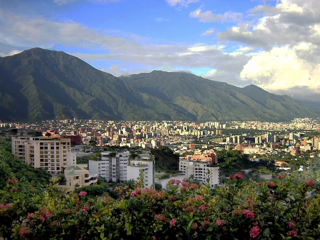 Vista del este de Caracas desde el mirador de Valle Arriba